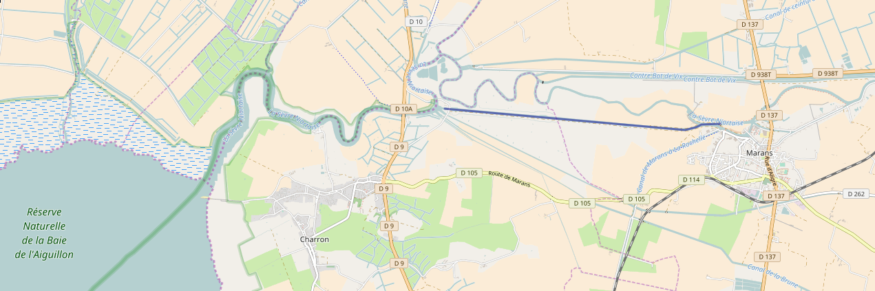 Le canal maritime de Marans (Charente-Maritime - France).